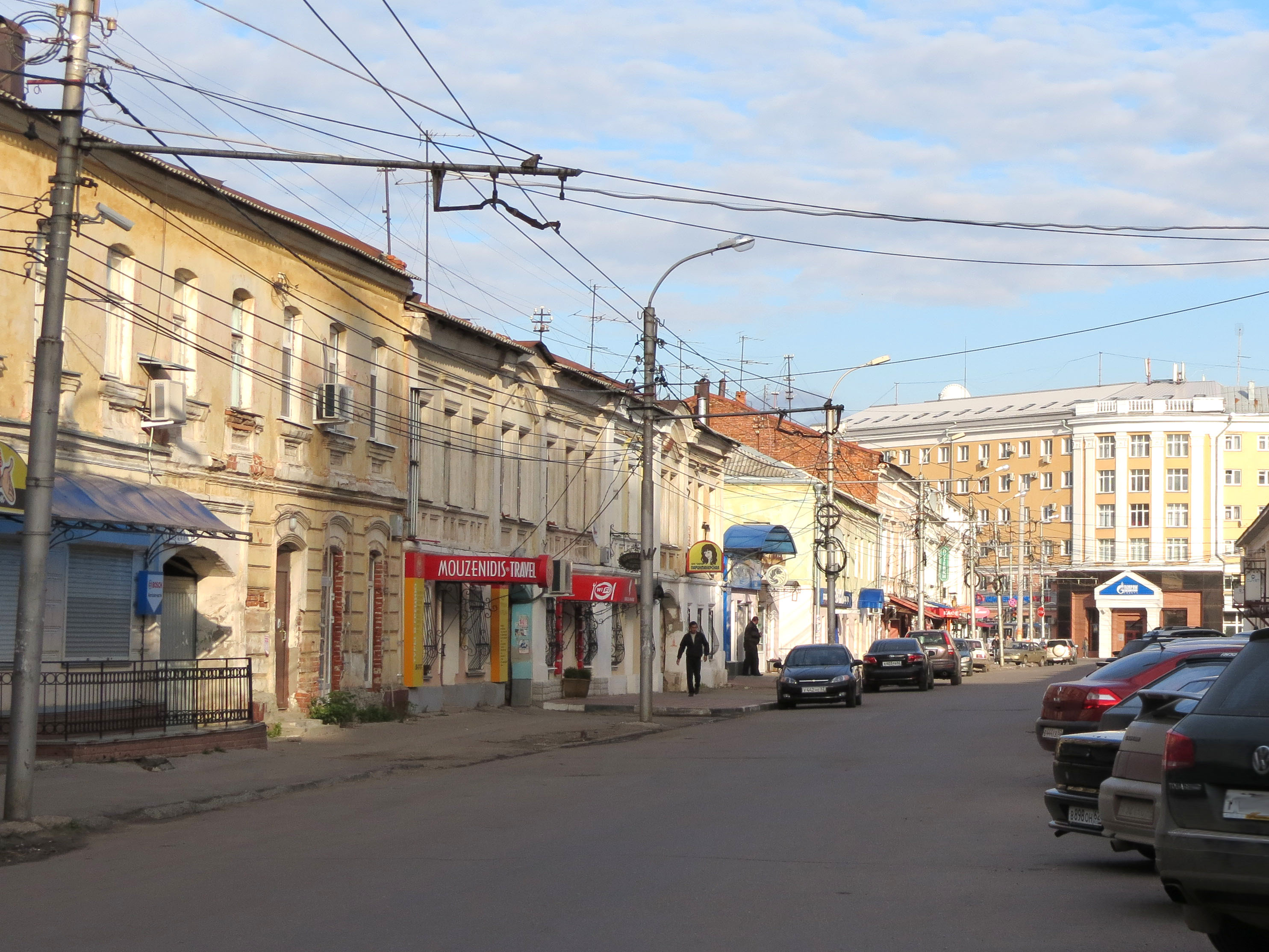 вид на ул.Кольцова рязань